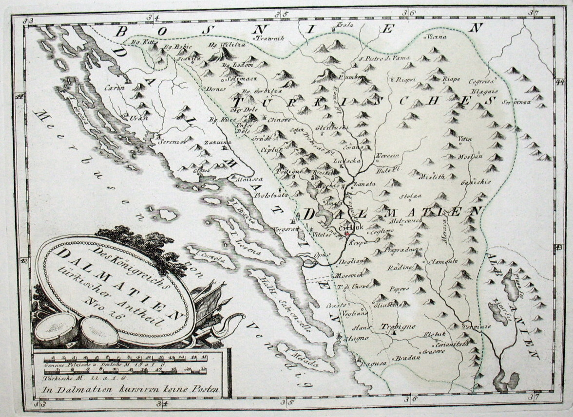 Des Königreichs Dalmatien türkischer Antheil. Nro. 26. Kolorierter Kupferstich